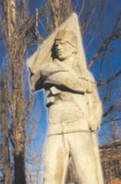 Паметник на Никола Симов - Куруто, по проект на Петър Куцаров